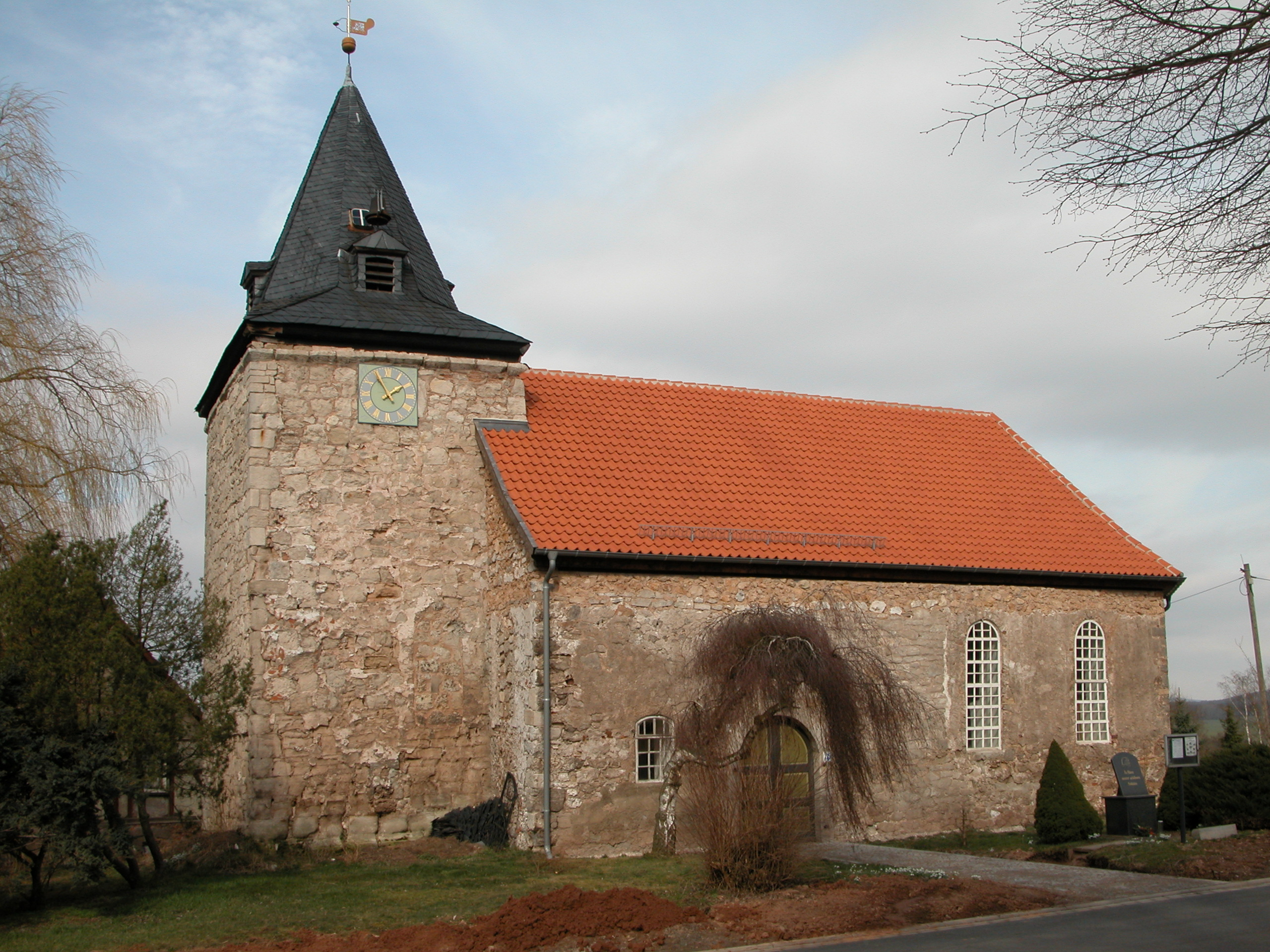 2004 in Pützlingen